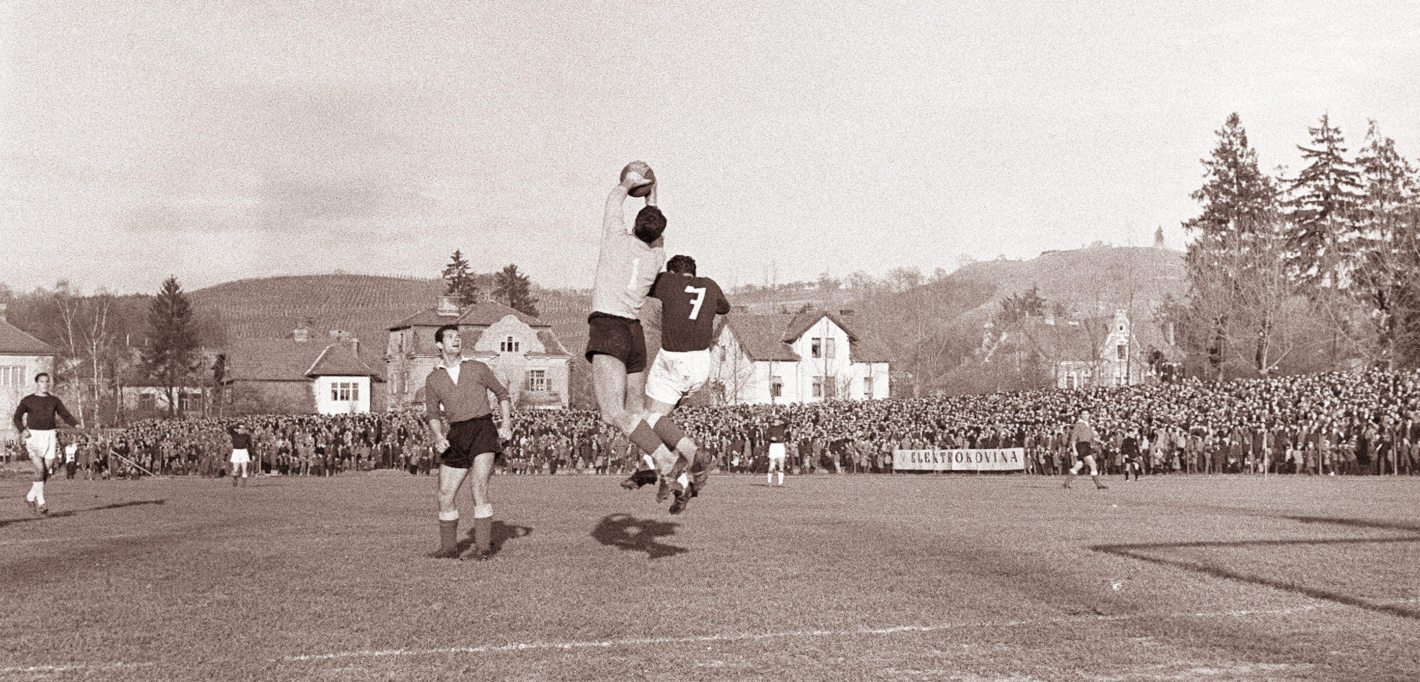 Nogomet Maribor - Sloboda